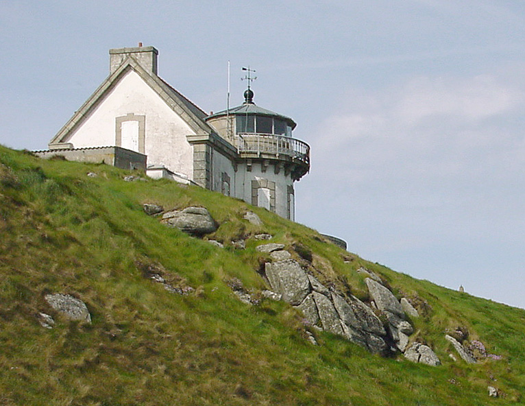 La maison-feu de la Pointe du Millier (le feu a été allumé pour la première fois en 1881).